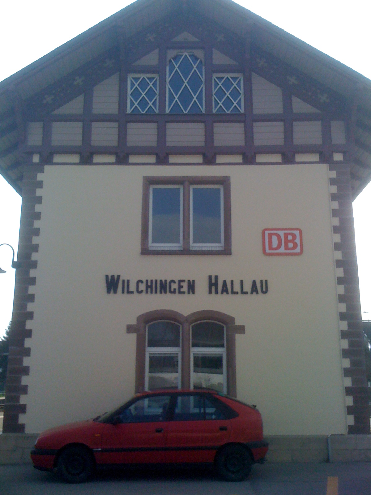 Der Bahnhof Wilchingen-Hallau der DB in der Schweiz.